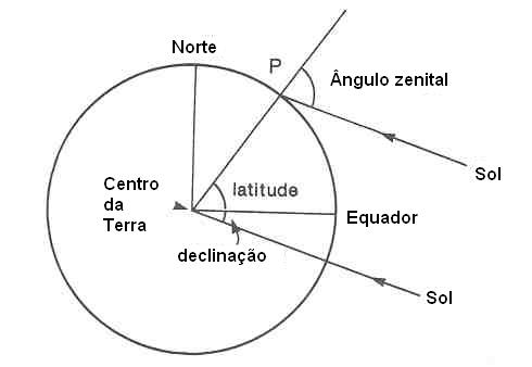 Esquema demonstrando as razões astronómicas da noite/dia polares. Esquema modificado a partir de uma versão muito comum em textos de astronomia.